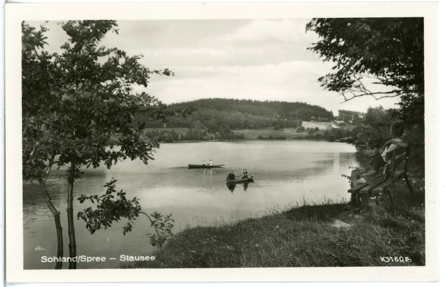 Sohland; Stausee This postcard is from publisher Brück & Sohn in Meißen ( postcard has a unique number 28594 and is available in a higher resolution at the publisher. This images was uploaded in a cooperation project between Wikipedians and the publisher.